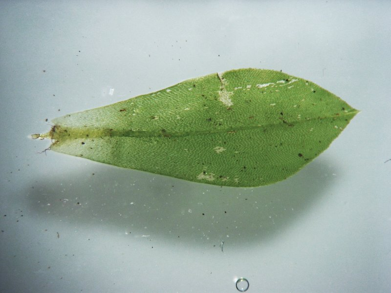 Rosenmoos (Rhodobryum roseum), Blatt, Vergrößerung: 25x